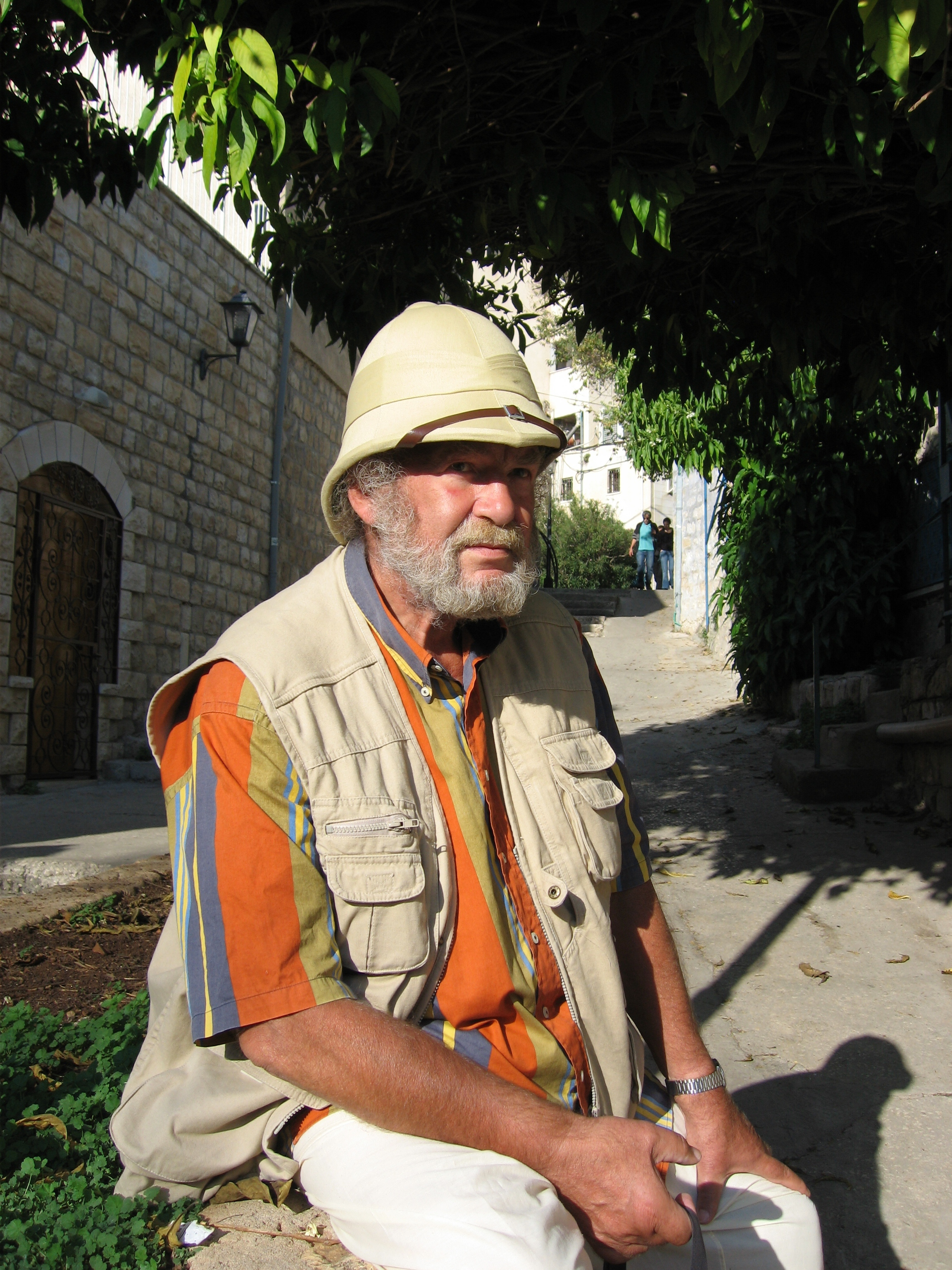 Jakob Andersen at Zefat